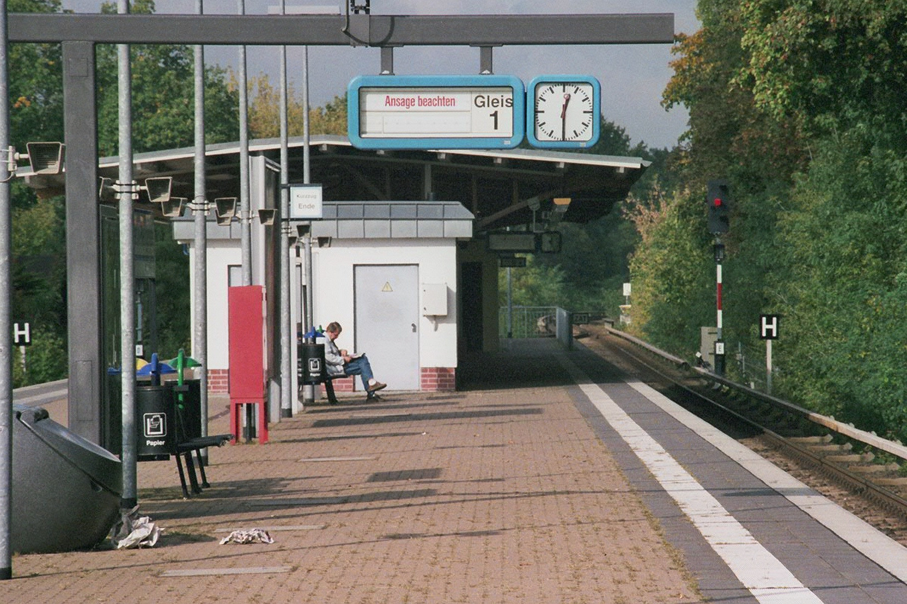 Train Station Heiligensee_North3